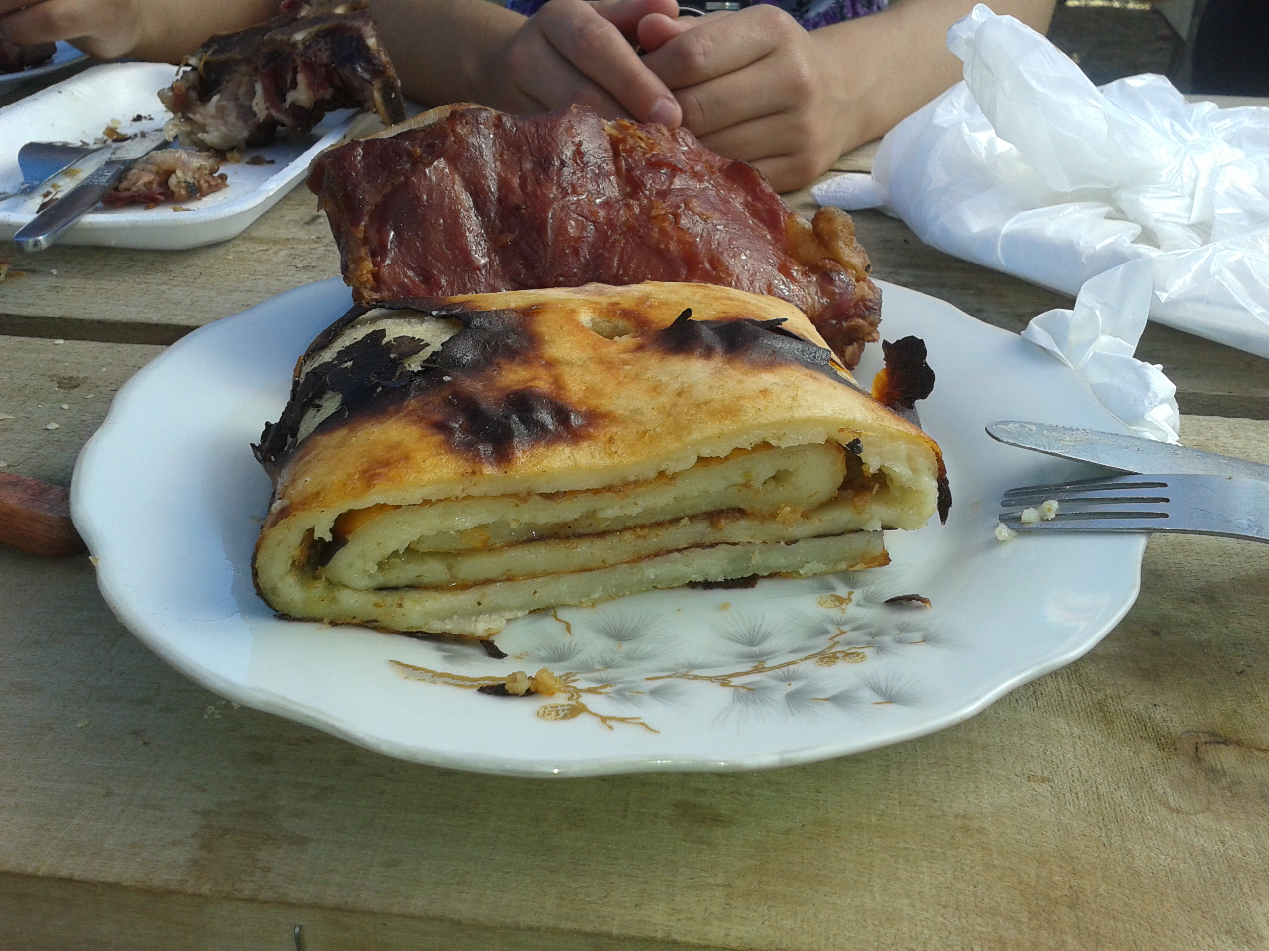 Aquí la chochoca servida, acompañada de chancho ahumado. Pid Pid, Castro, Chiloé